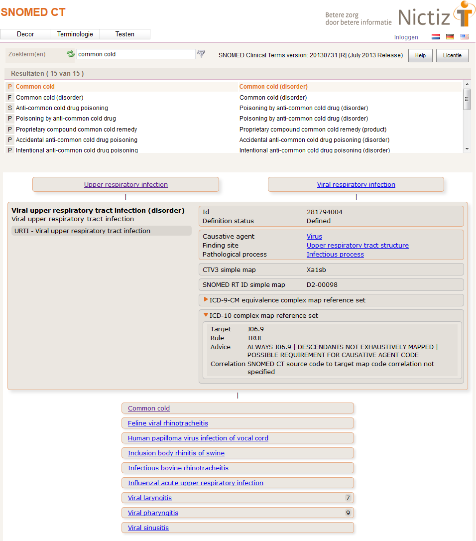 Nederlandse SNOMED CT Explorer